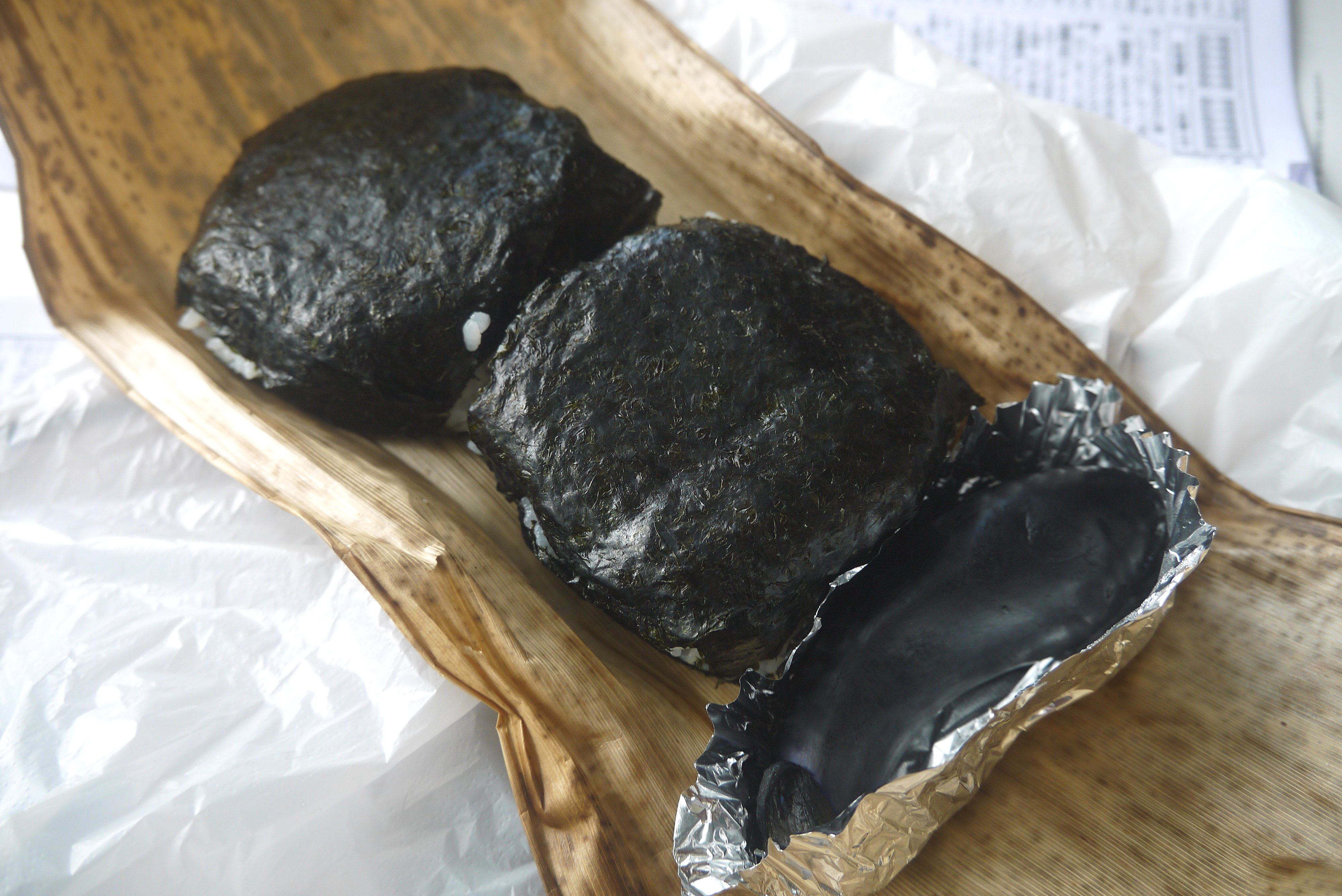 新潟県新潟市北区、のぞみ会、新潟競馬場、おにぎり